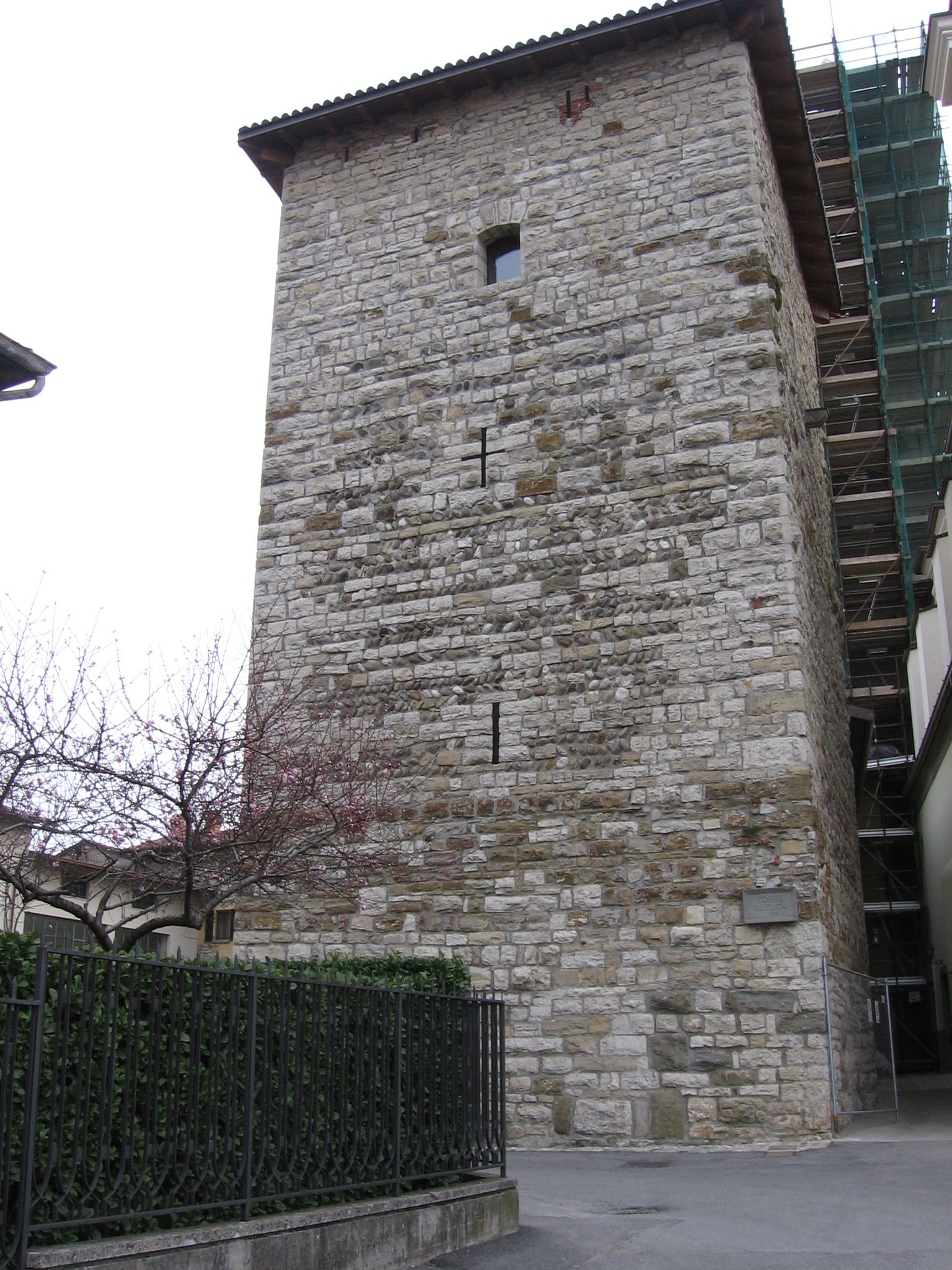 Bolgare, Bergamo, Italia